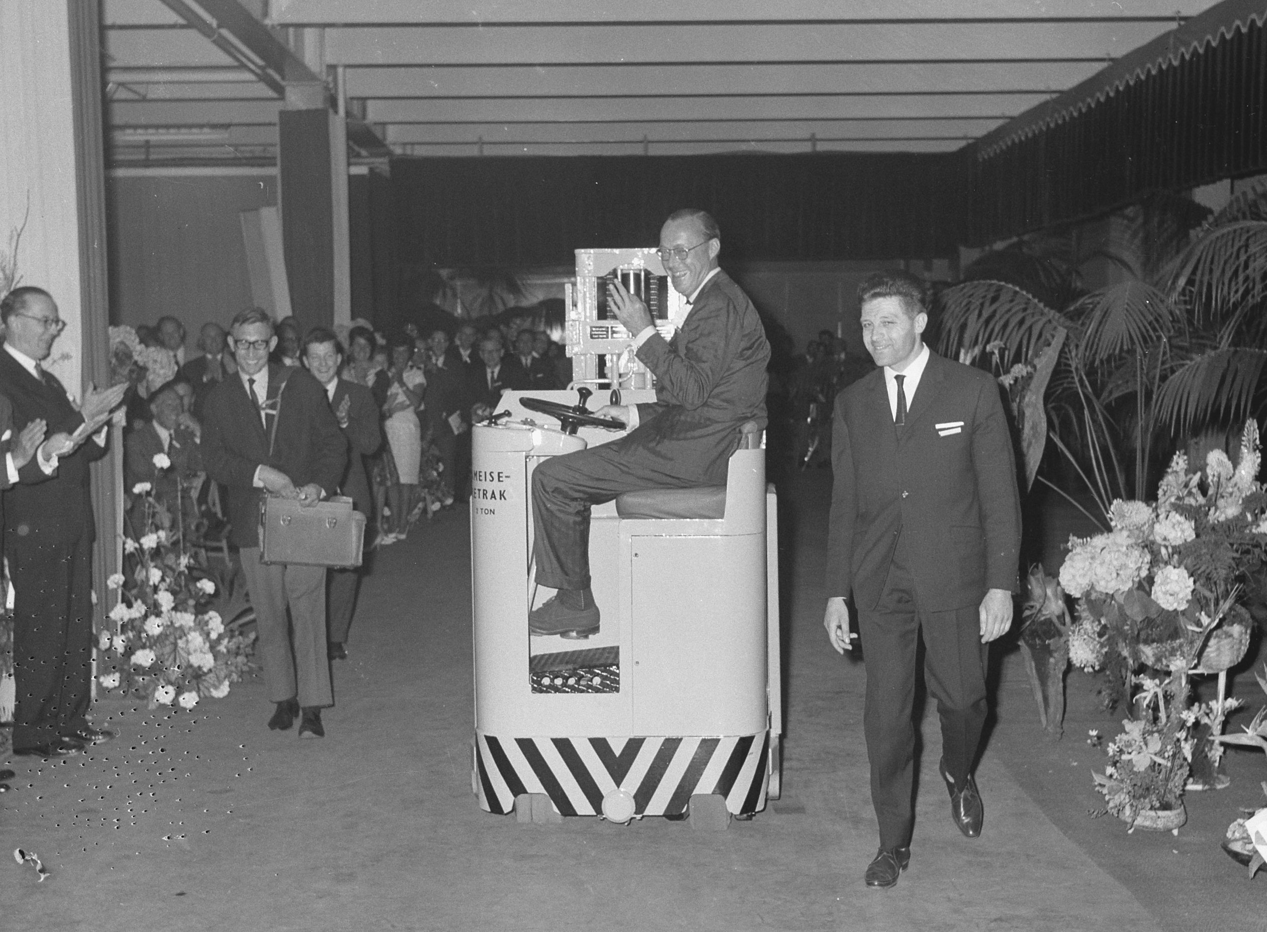 Collectie / Archief : Fotocollectie Anefo Reportage / Serie : [ onbekend ] Beschrijving : Prins Bernhard opende te Maastricht een nieuwe fabriek van de Koninklijke Nederlandse Papierfabriek met heftru Datum : 7 juni 1963 Locatie : Maastricht Trefwoorden : fabrieken Persoonsnaam : Bernhard, prins Fotograaf : Nijs, Jac. de / Anefo Auteursrechthebbende : Nationaal Archief Materiaalsoort : Negatief (zwart/wit) Nummer archiefinventaris : bekijk toegang 2.24.01.03 Bestanddeelnummer : 915-2331